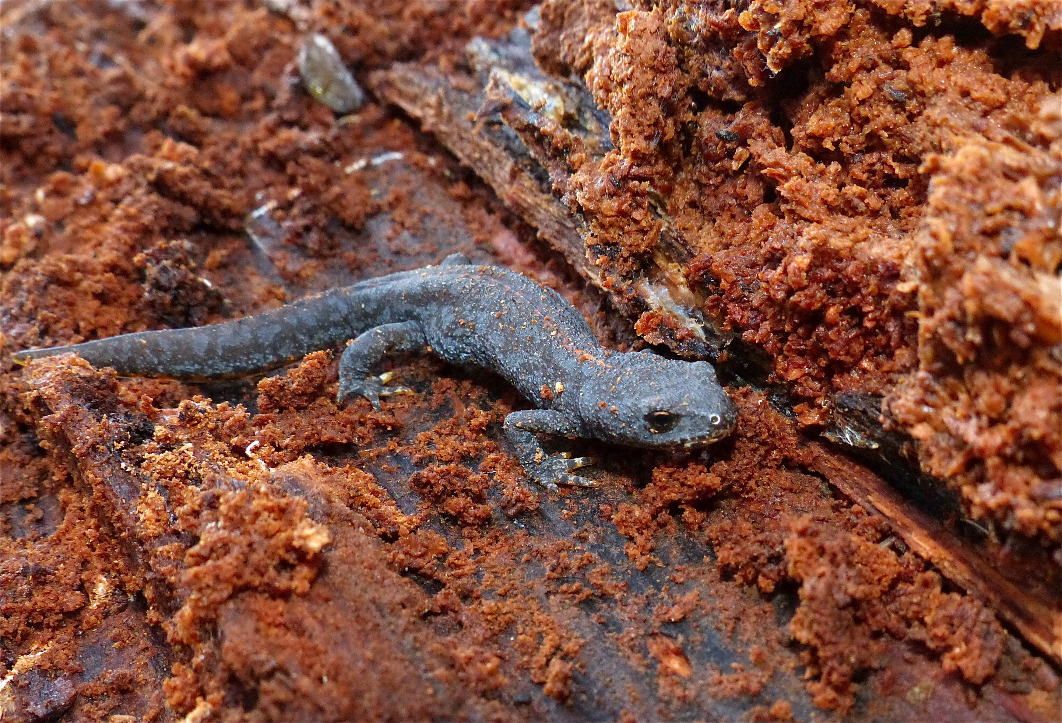 Forêt d' Ecouves, Orne, FRANCE